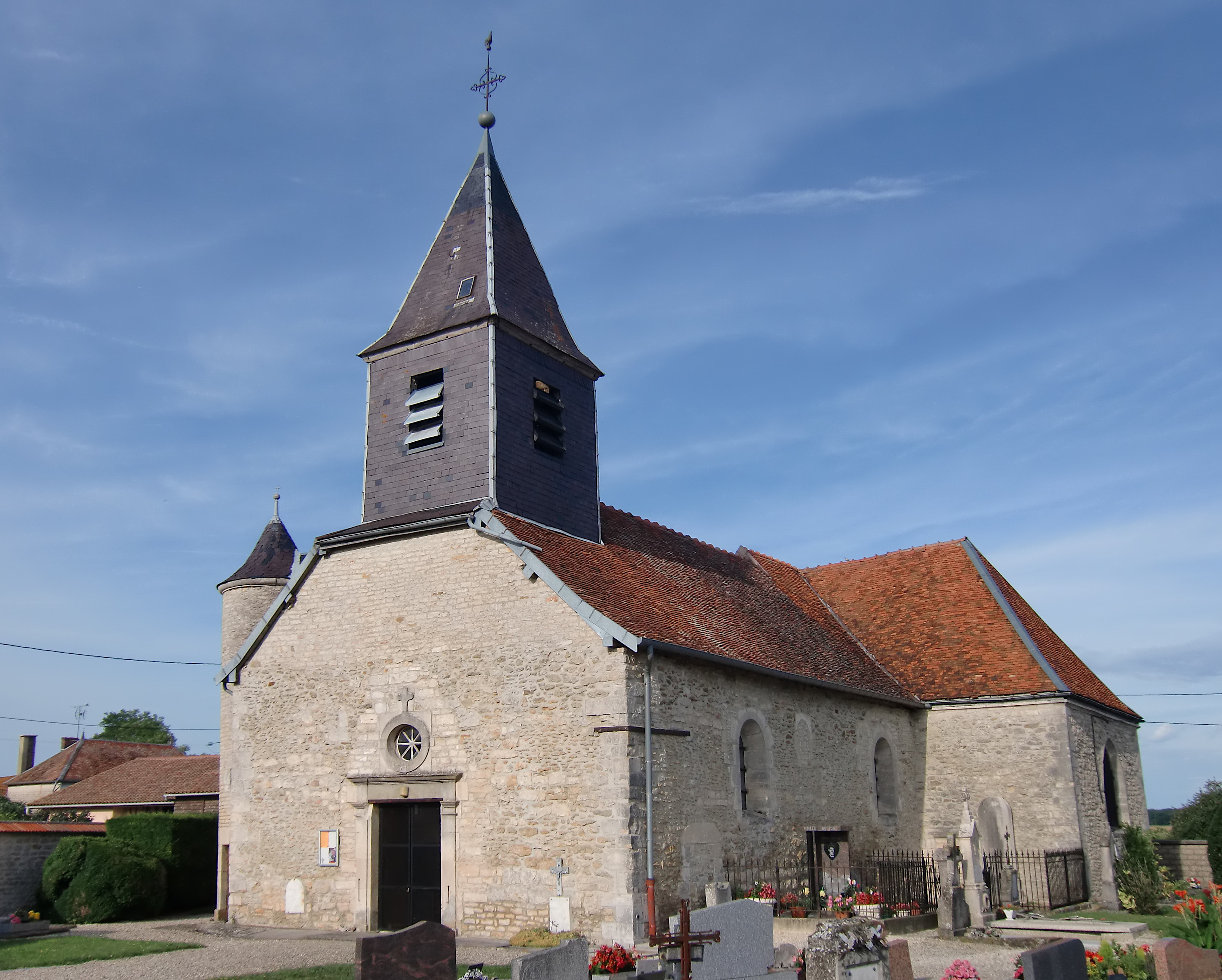 église de Petit-Mesnil (Aube, Champagne, France)